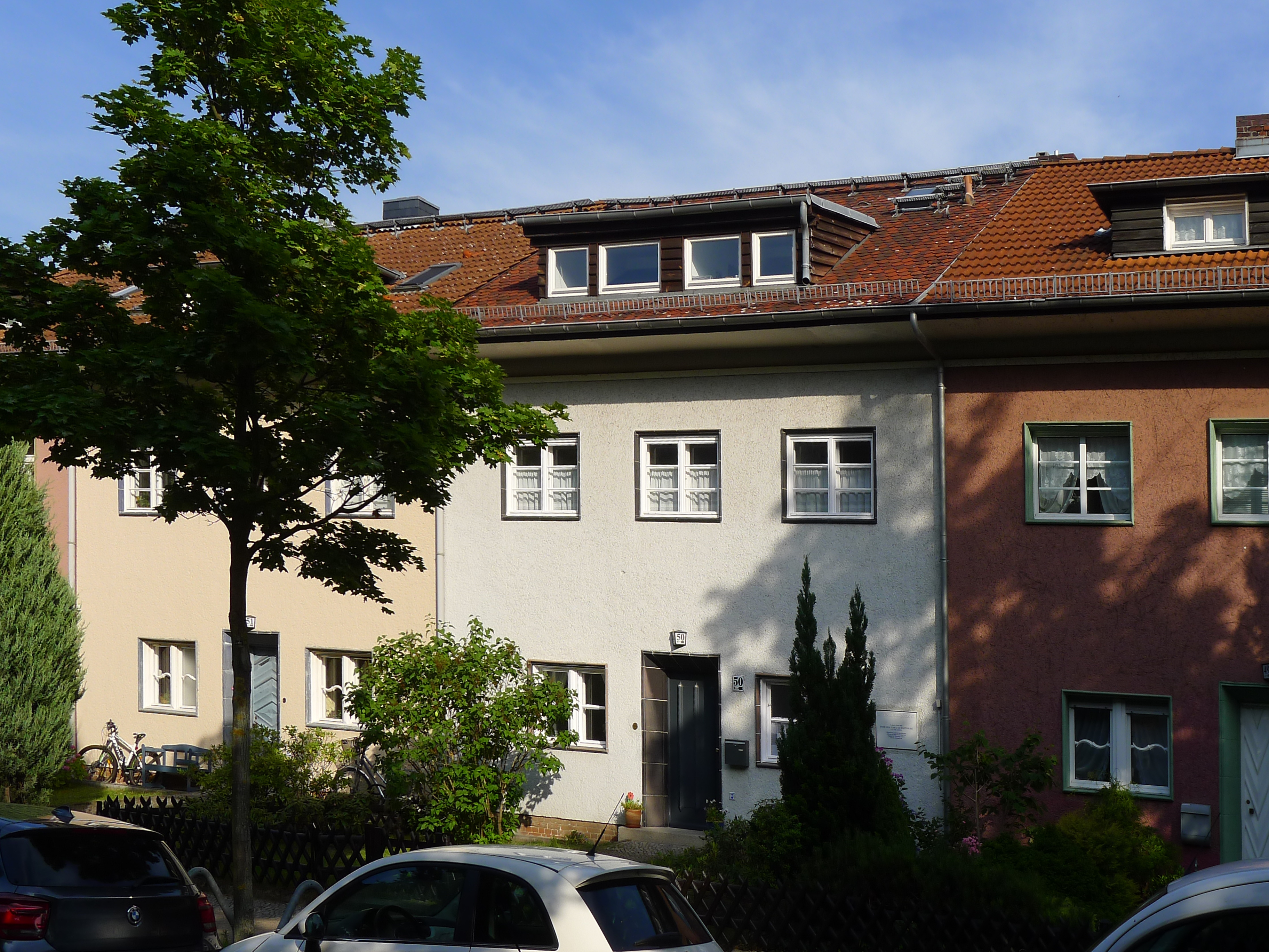 Reihenhausanlage